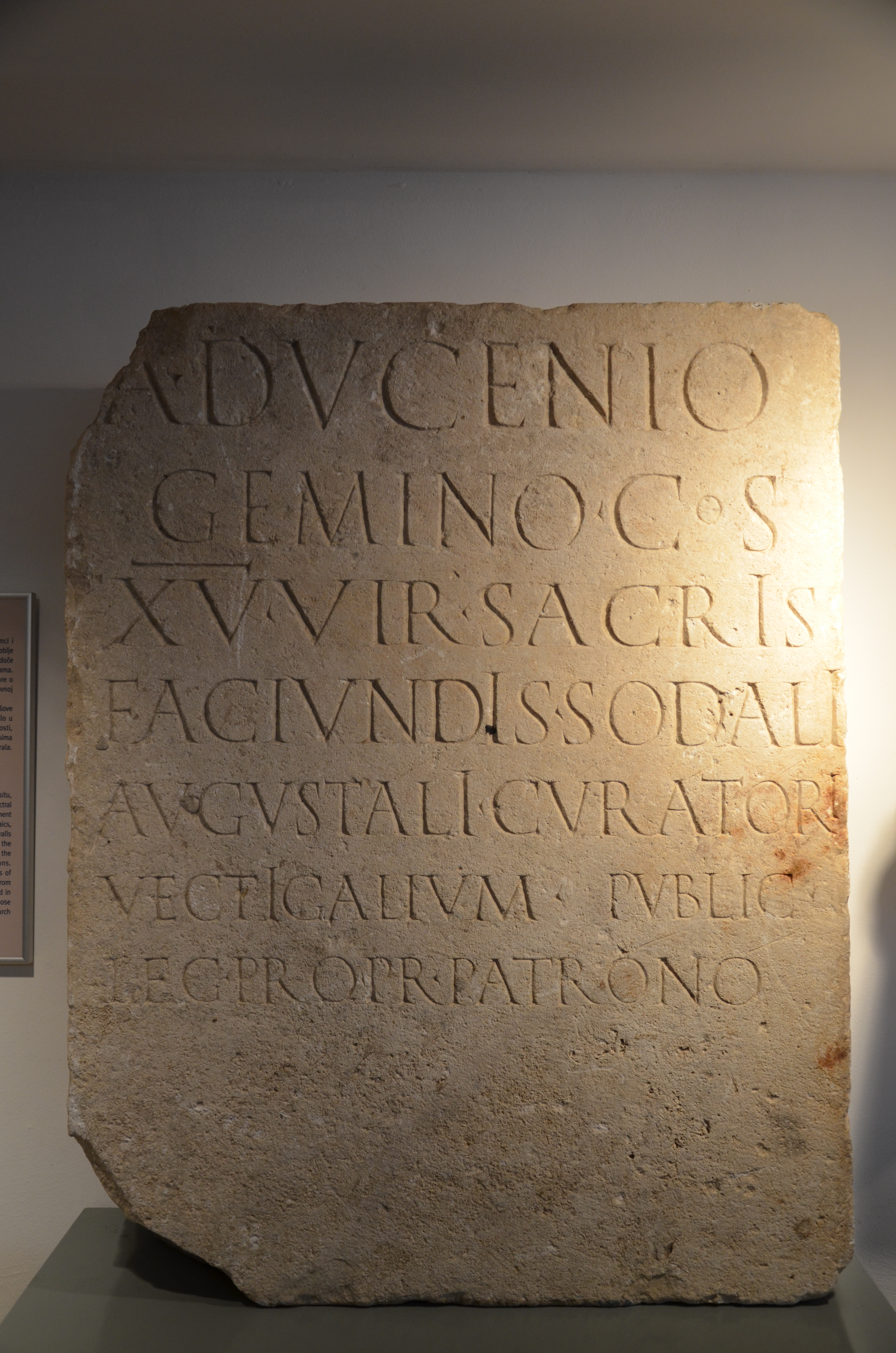 Archaeological museum Narona, Vid, Croatia. ILJug 3, 1879: A(ulo) Ducenio / Gemino co(n)s(uli) / XVvir(o) sacris / faciundis sodali / Augustali curatori / vectigalium public(orum) / leg(ato) pro pr(aetore) patrono